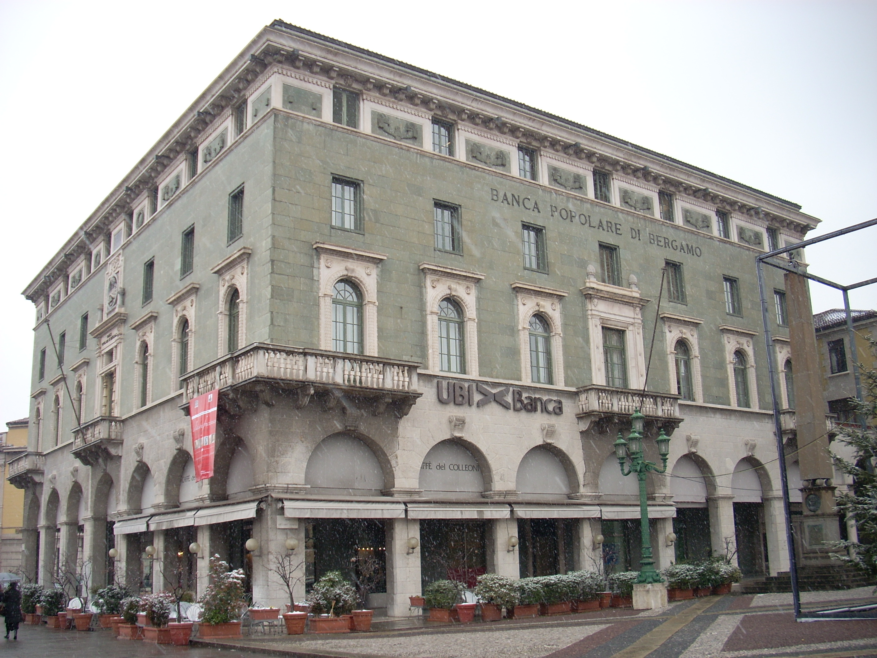 Banca Popolare di Bergamo, now UBI Banca, Bergamo, Italy - by Giovanni Muzio